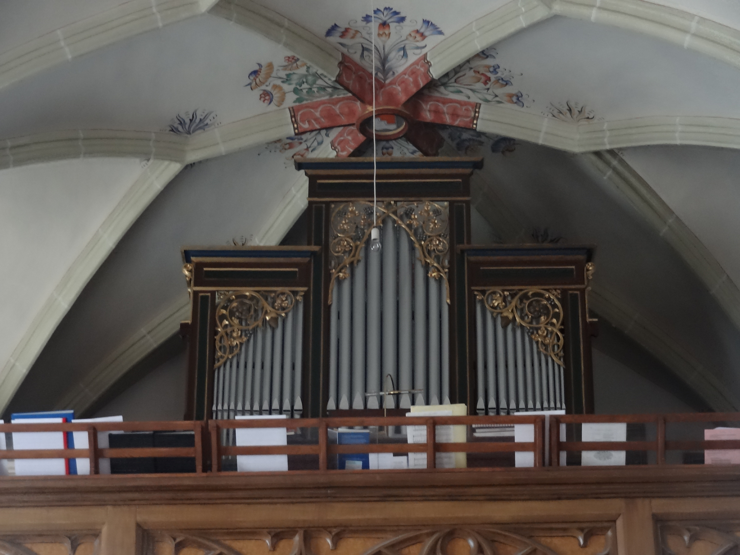 Orgel der Pfarrkirche St. Johann in Seyboldsdorf (Stadt Vilsbiburg, Lkr. Landshut)